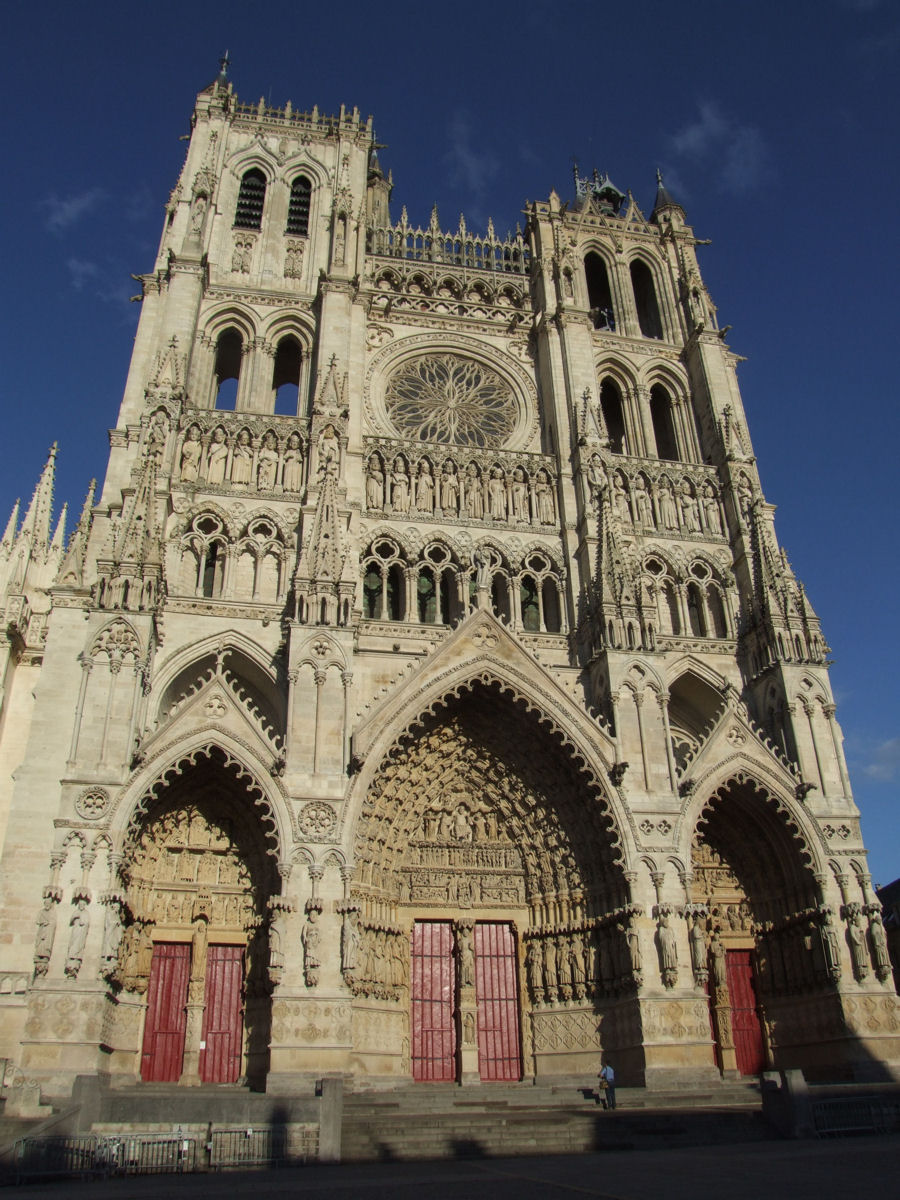 Amiens Cathedral (Cathédrale Notre-Dame d'Amiens), France Façade occidentale de la cathédrale d'Amiens.